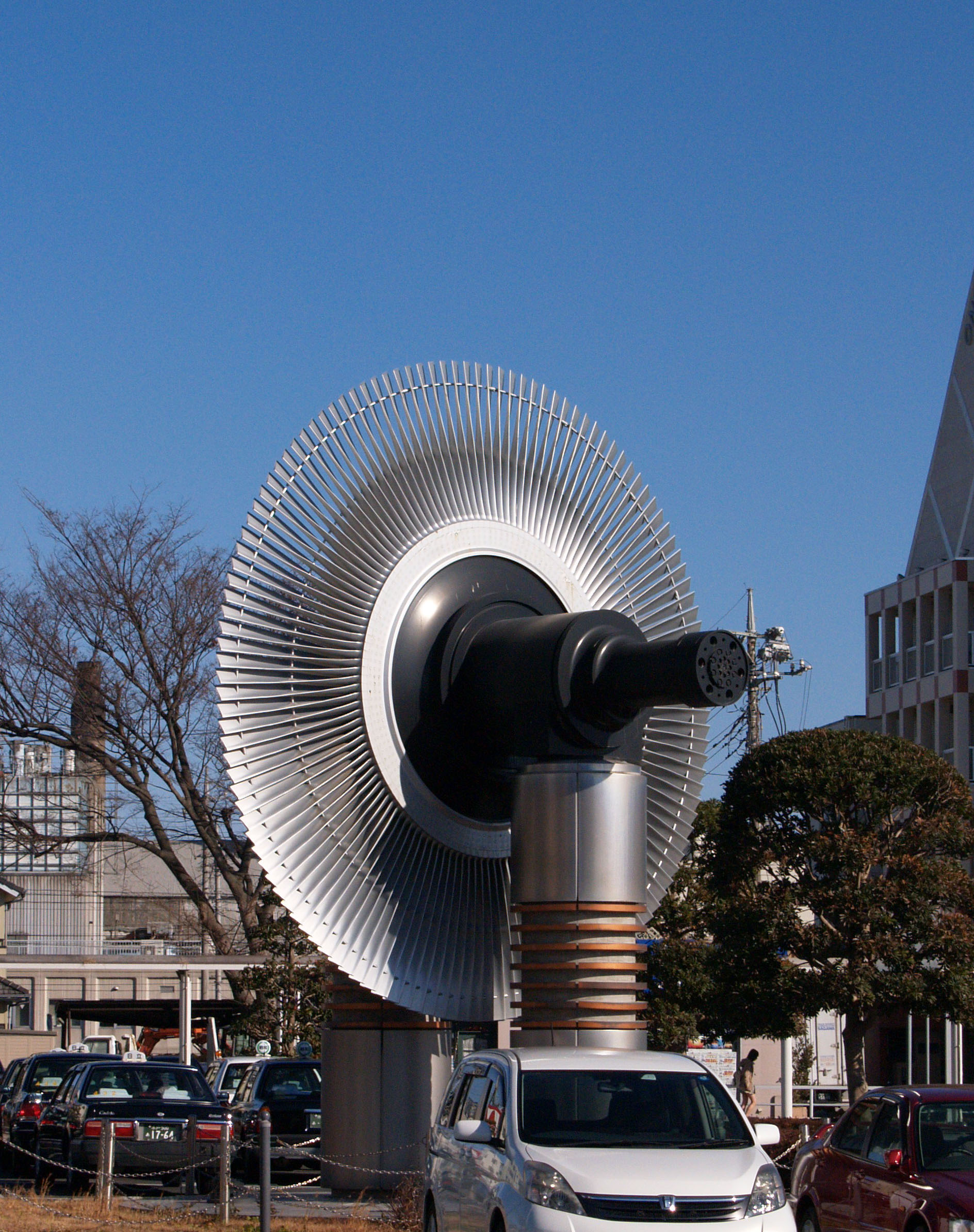 日立駅前にあるタービンモニュメント